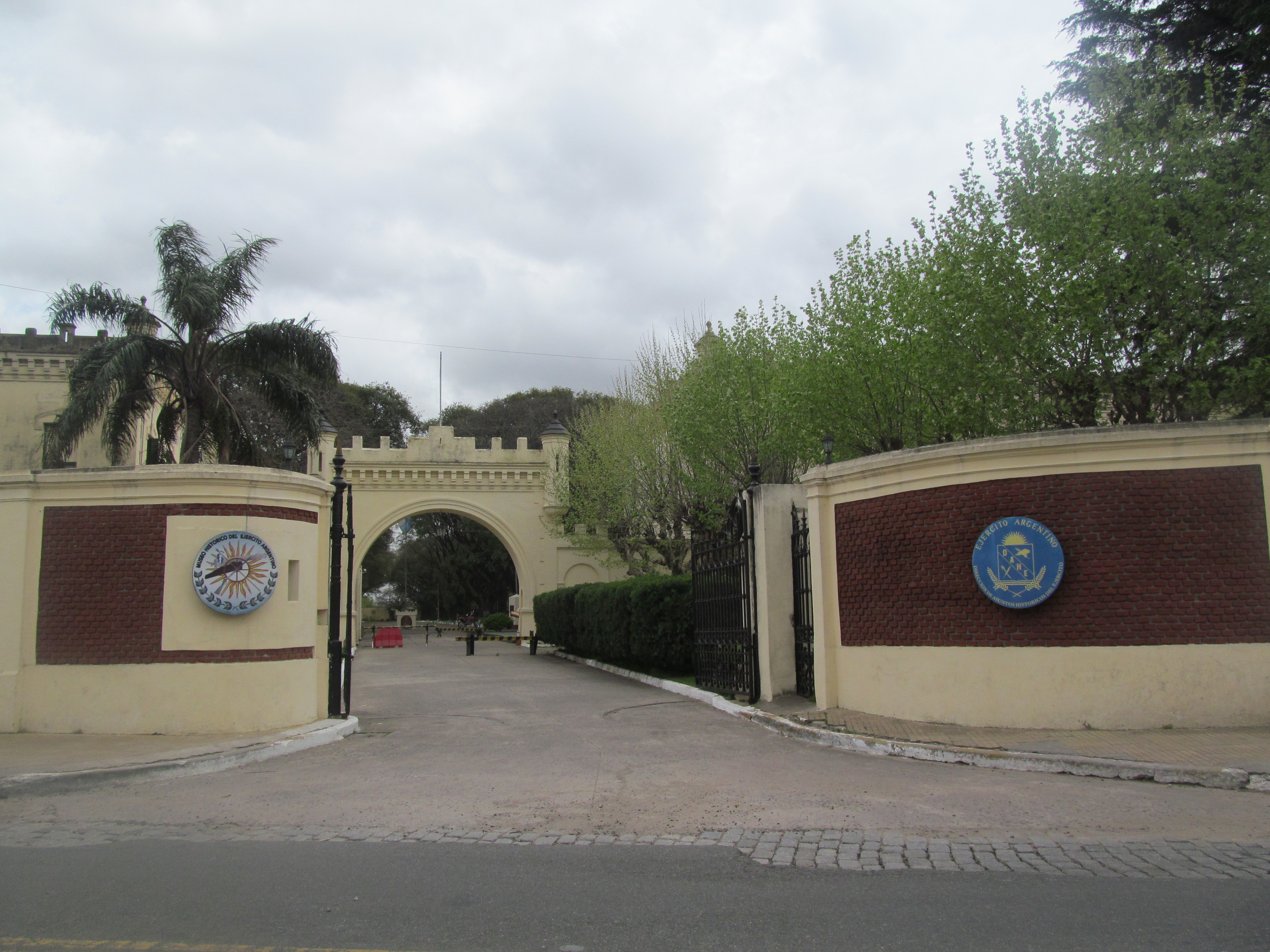 Entrada al Museo Histórico del Ejército Argentino. Ciudadela, Prov. de Buenos Aires.